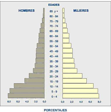 Piramide de población del Cantón Guamote, en la provincia de Chimborazo en el Ecuador